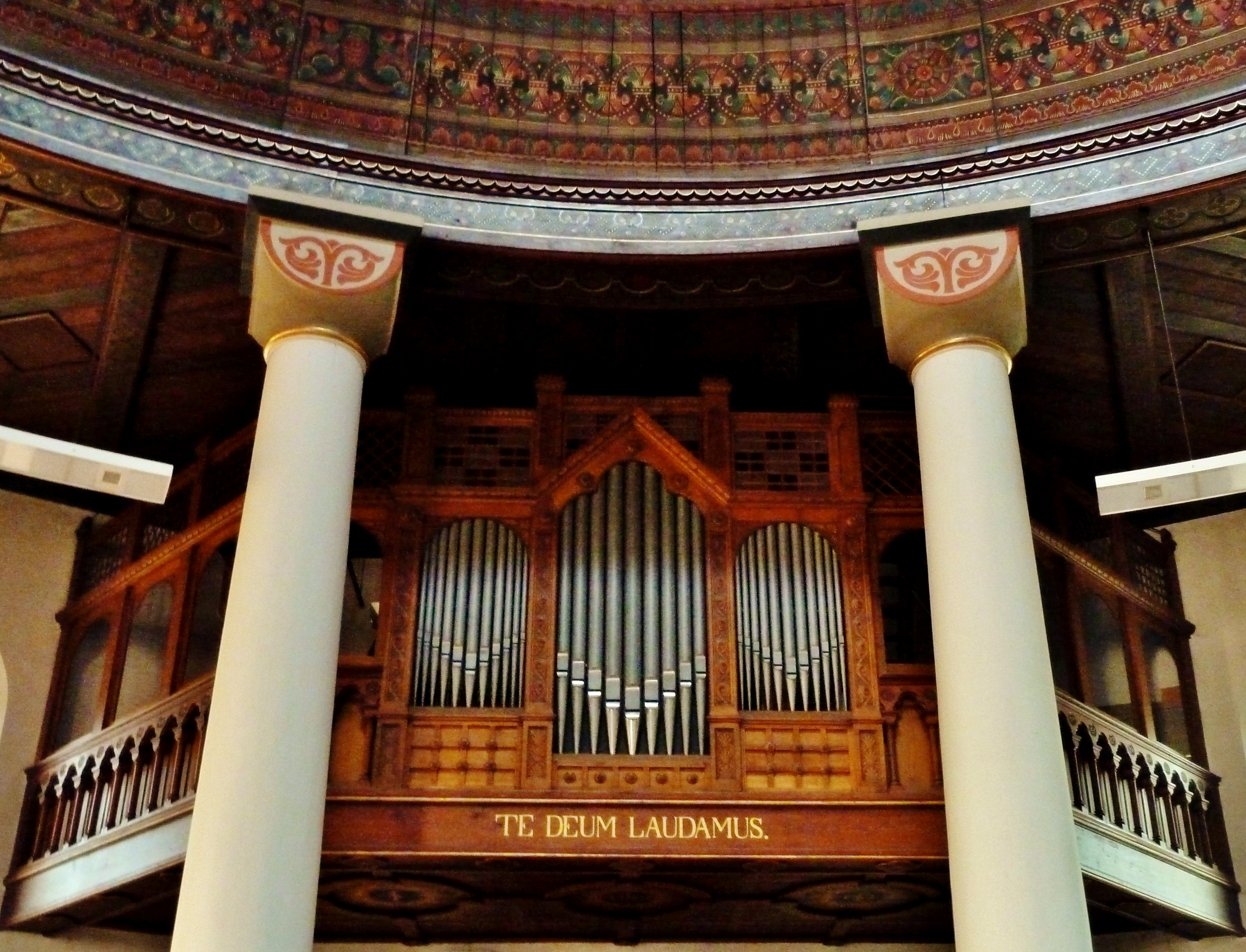 Orgel der St.-Petrus-Kirche in Gesmold. Romantische Orgel der Fa. Haupt Osterkappeln. Erneuert durch die Fa. Breil 1982